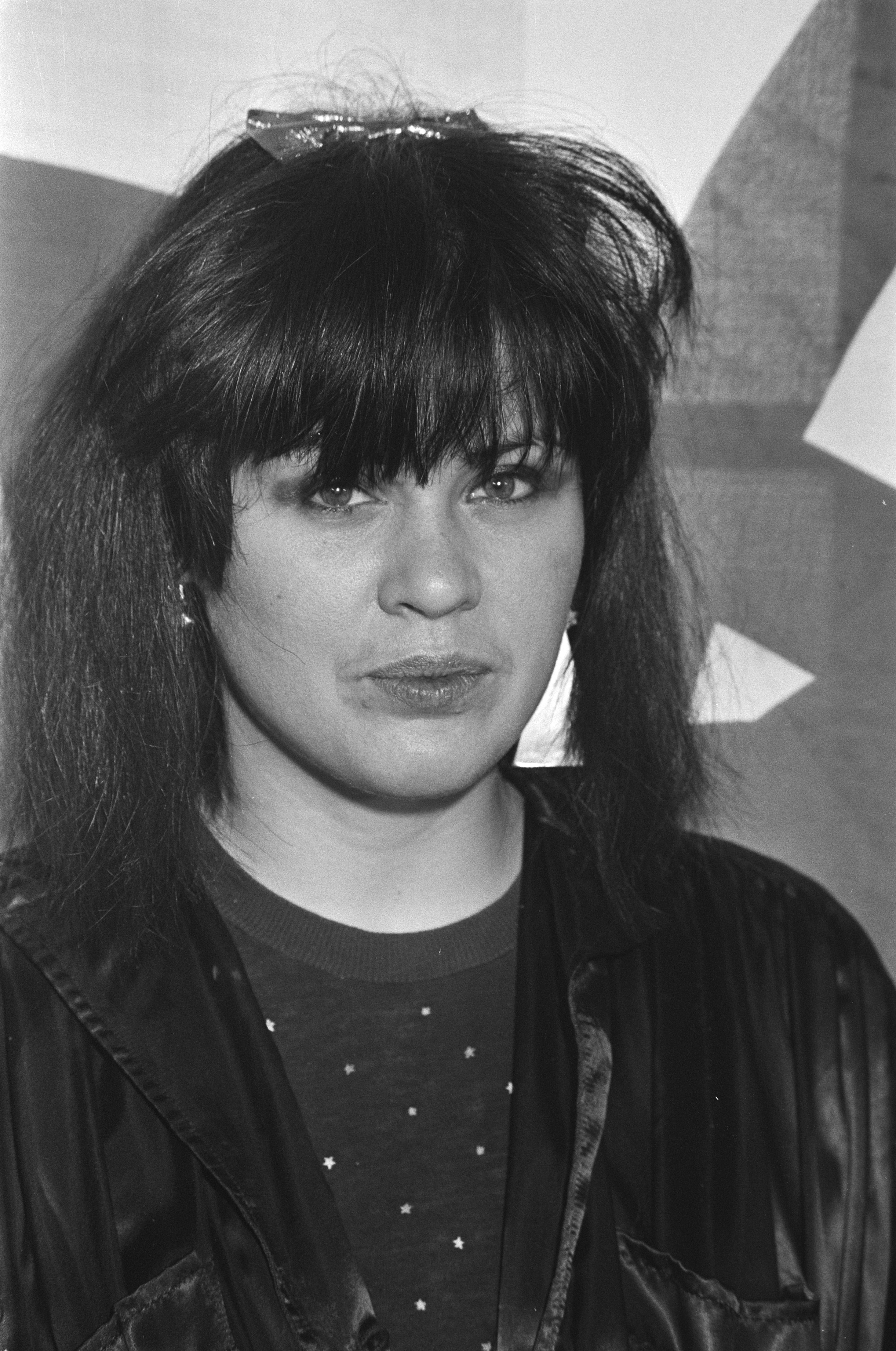 Collectie / Archief : Fotocollectie Anefo Reportage / Serie : Uitreiking "Kruiwagen" en "Conamus Export Prijs" tijdens radioprogramma Open House Beschrijving : Fay Lovsky Datum : 31 december 1981 Locatie : Loosdrecht Trefwoorden : muziek, prijsuitreikingen, radioprogramma's Persoonsnaam : Lovsky, Fay Fotograaf : Dijk, Hans van / Anefo Auteursrechthebbende : Nationaal Archief Materiaalsoort : Negatief (zwart/wit) Nummer archiefinventaris : bekijk toegang 2.24.01.05 Bestanddeelnummer : 931-8875 Reacties Geplaatst door Maaike op 18 augustus 2012 - 14:47. Tros Radio Prijs: Tros Kruiwagen